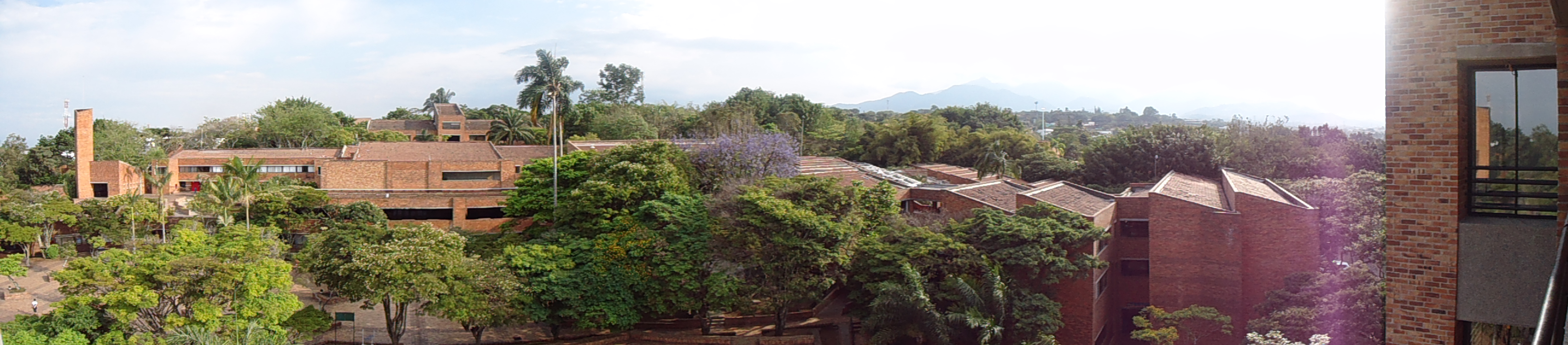 Panoramica Pontificia Univesidad Javeriana